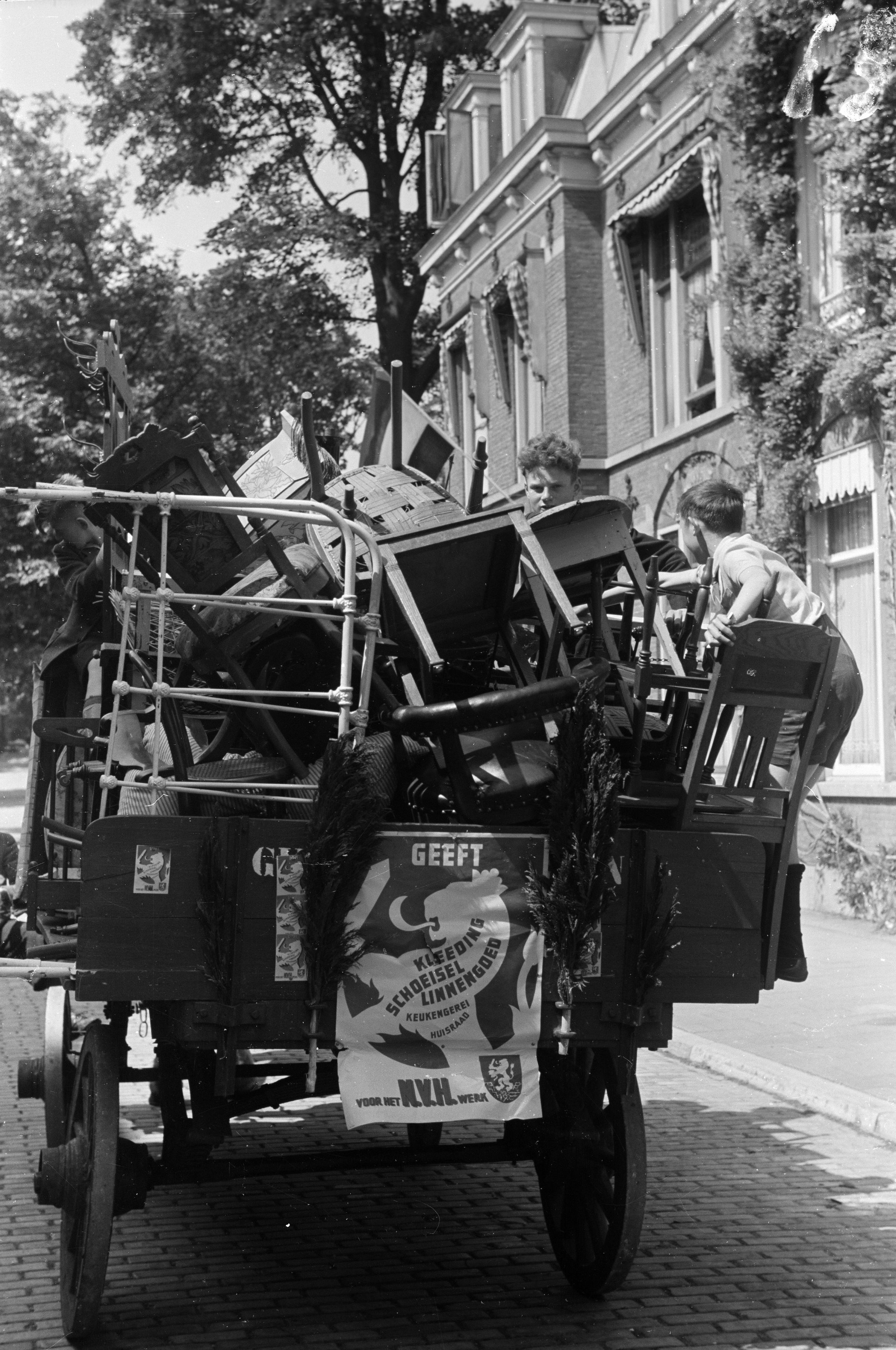 Foto uit de collectie Huizinga van het NIOD. Twee jongens op een paardenkar vol meubelen, opgehaald ten bate van het N.V. H. werk. Menno Huizinga was onderdeel van de Ondergedoken Camera en maakte illegaal foto’s tijdens de bezetting. Dit deed hij hoofdzakelijk in zijn woonplaats Den Haag.